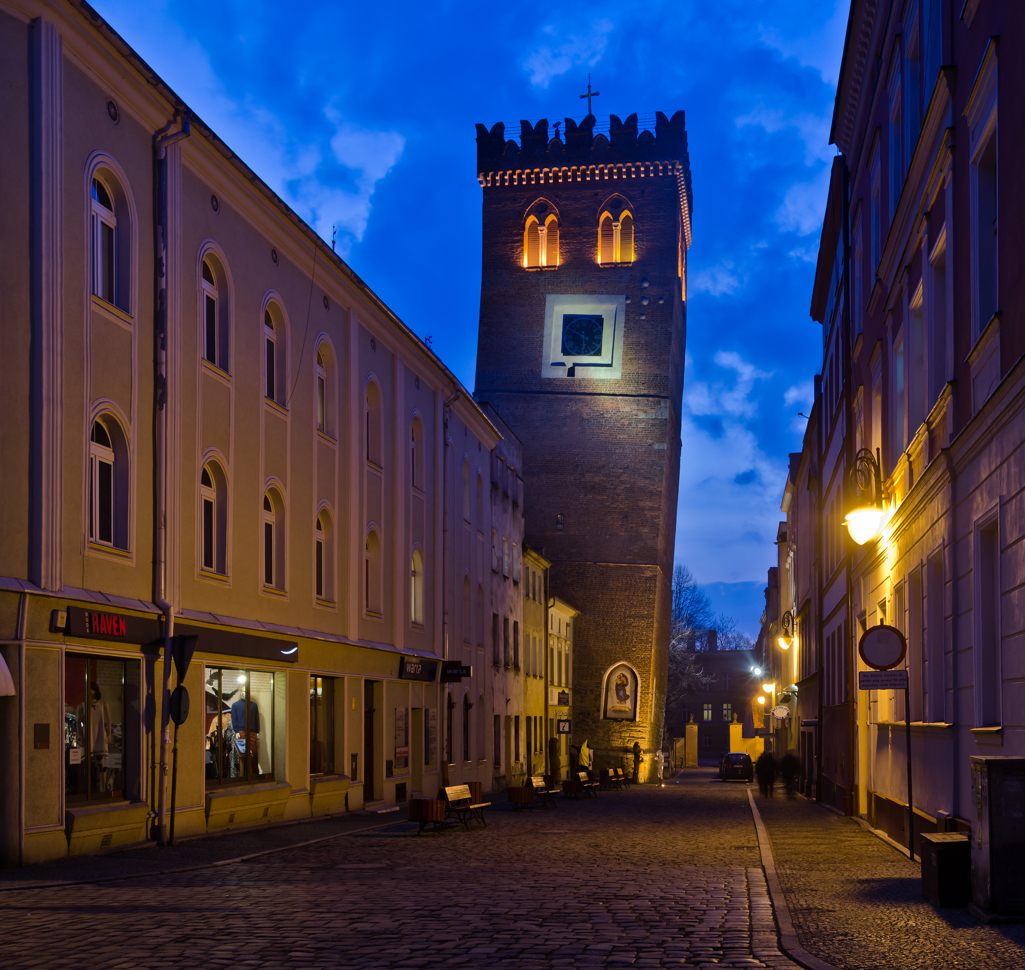 Ząbkowice Śląskie, dzwonnica, tzw. Krzywa Wieża, XV, XVII